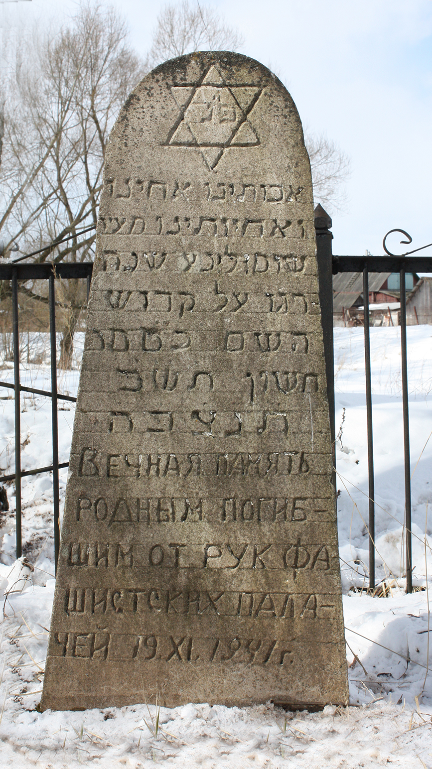 Памятник убитым евреям - узникам Шумилинского гетто. Находится в черте города, в районе "Добеев мох".